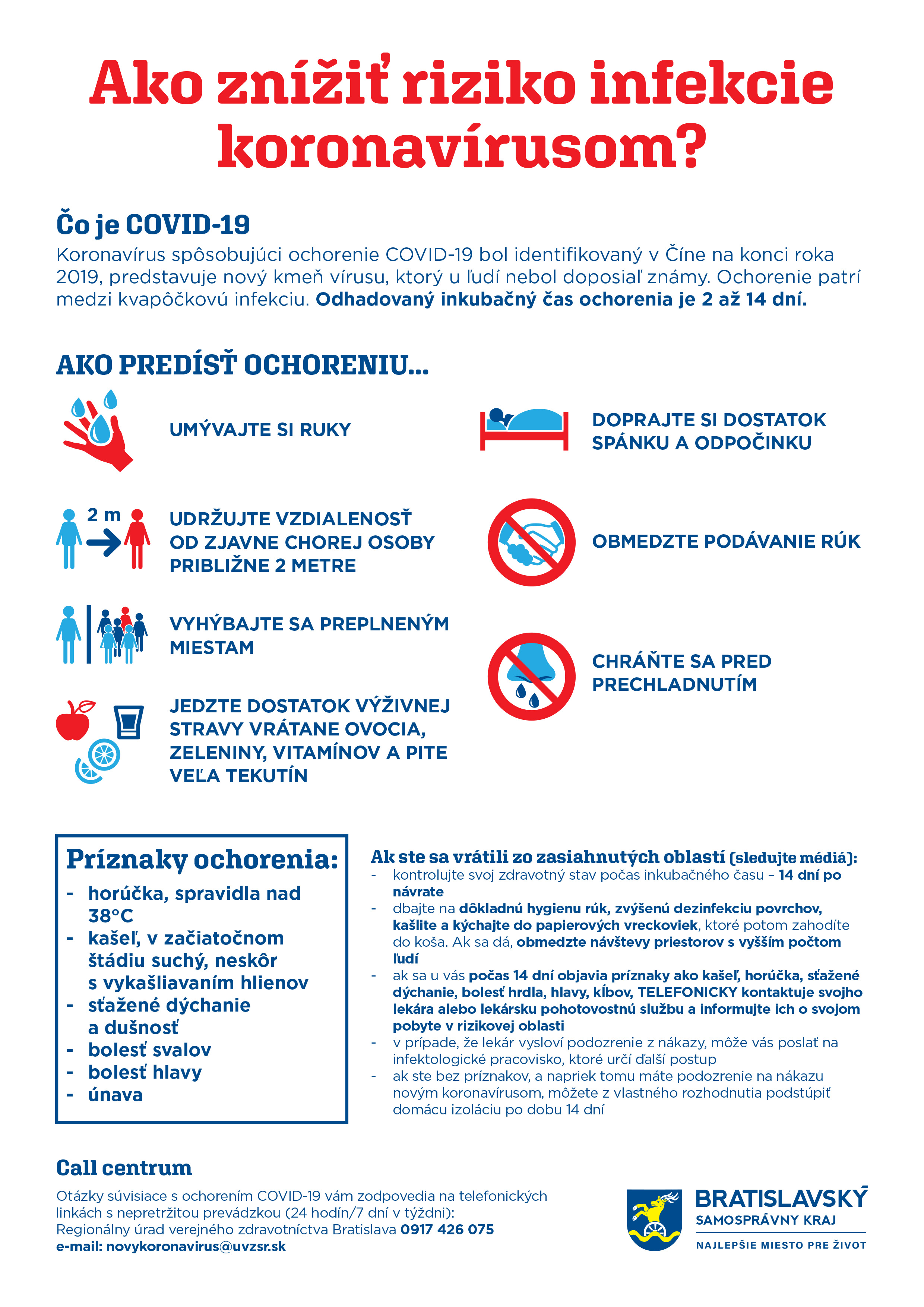 Koronavírus - Bratislavský samosprávny kraj